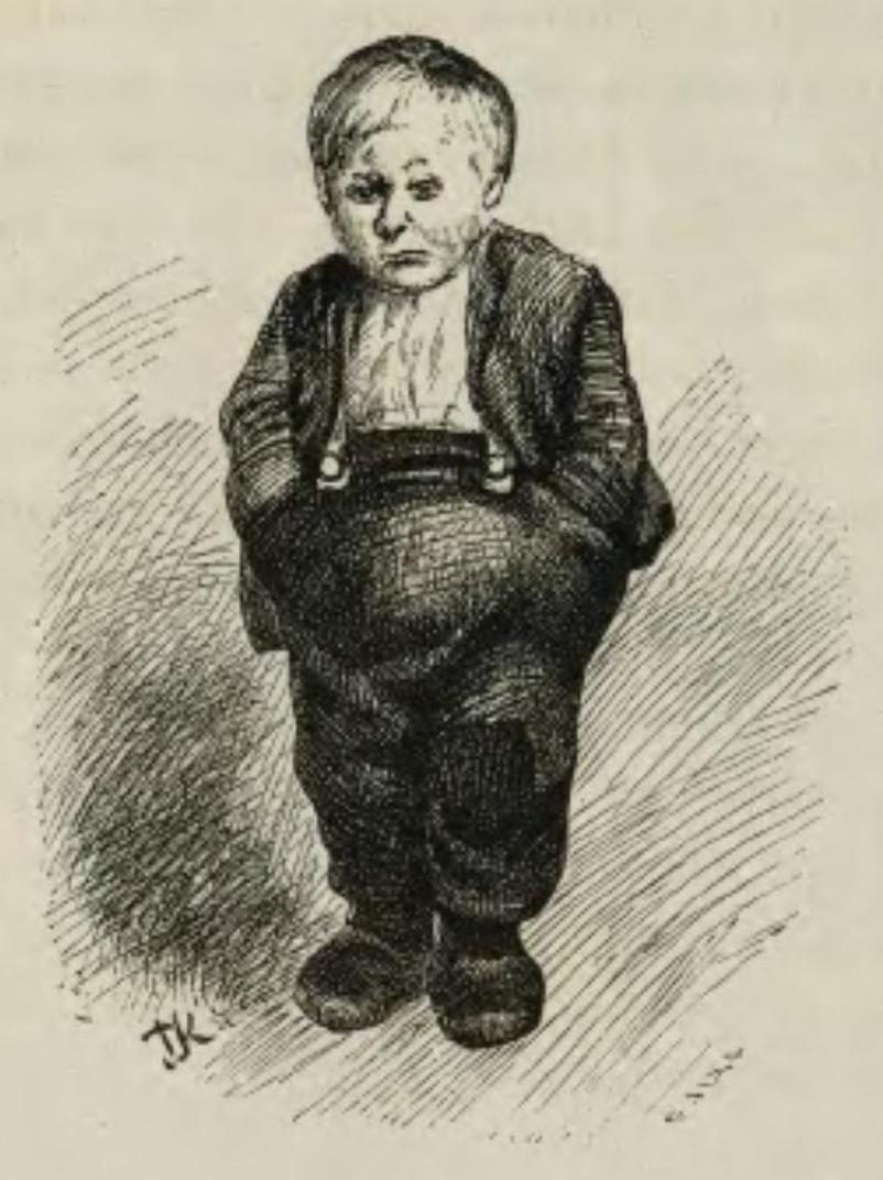 Sagobok för barn